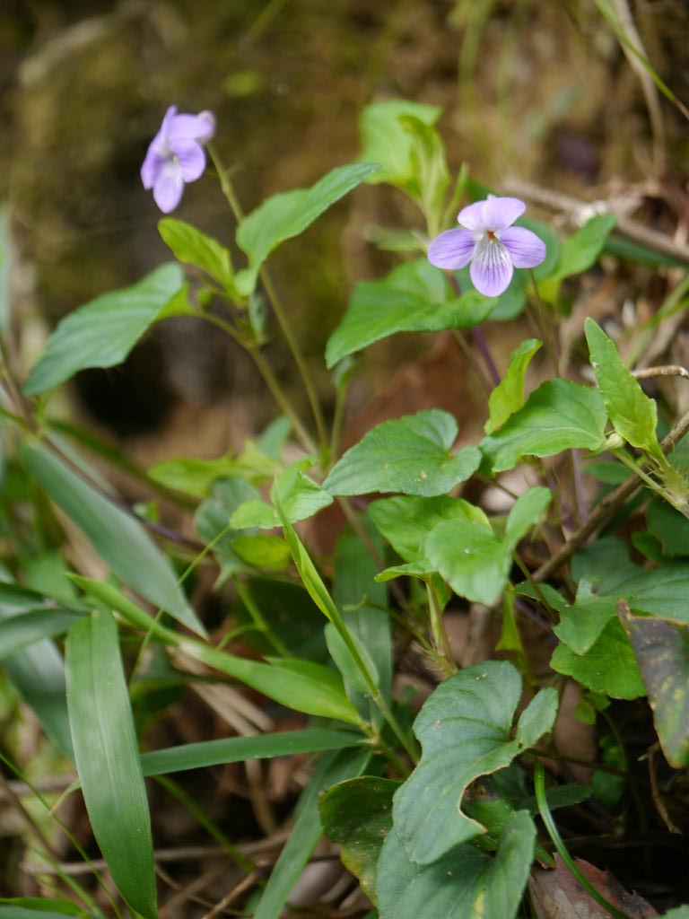 Viola ovato-oblonga：ナガバタチツボスミレ 2016/04/02 和歌山県田辺市：Tanabe City. Wakayama Pref. Japan